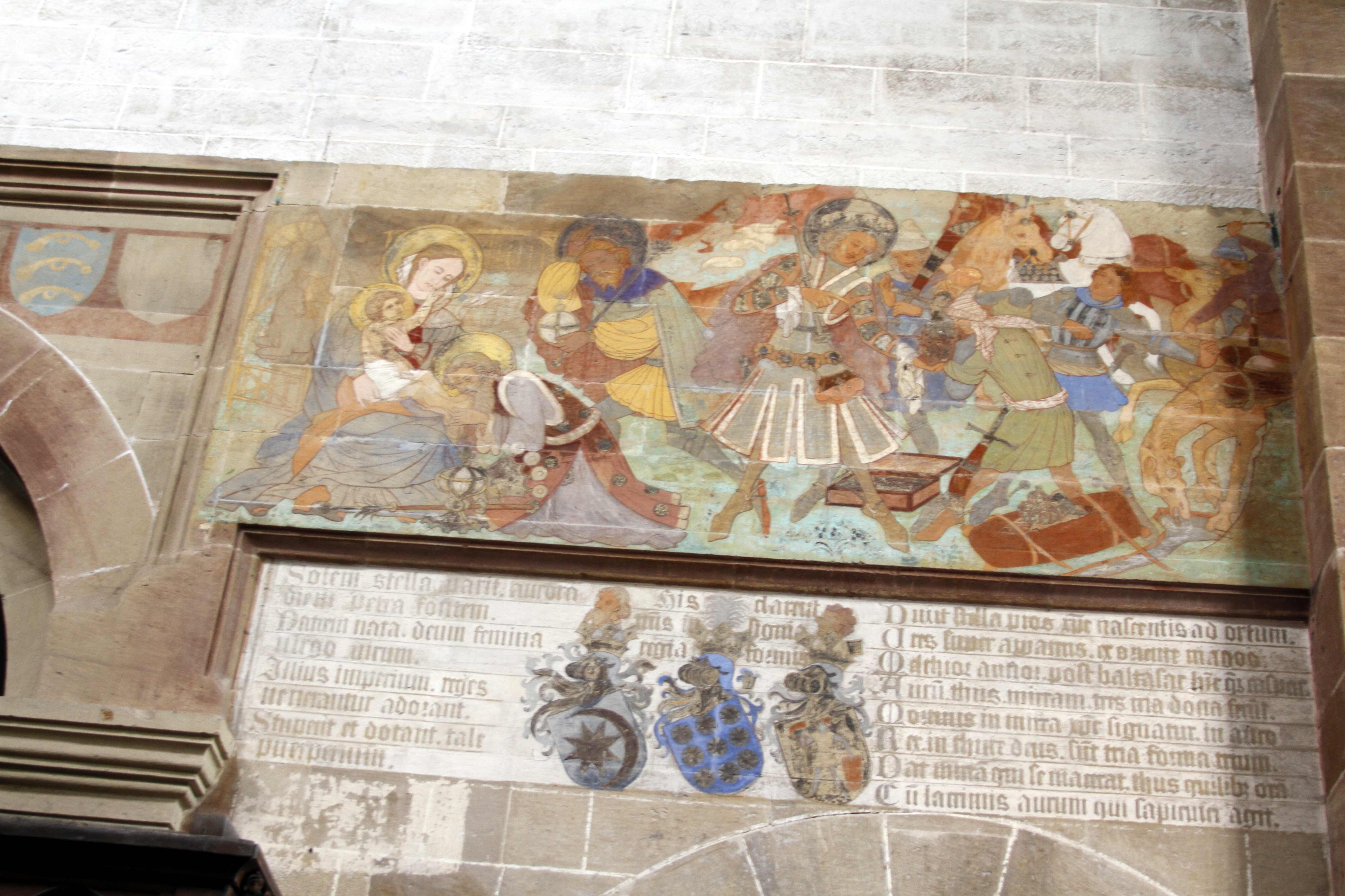 Maulbronn Monastery - Maulbronn - Germany